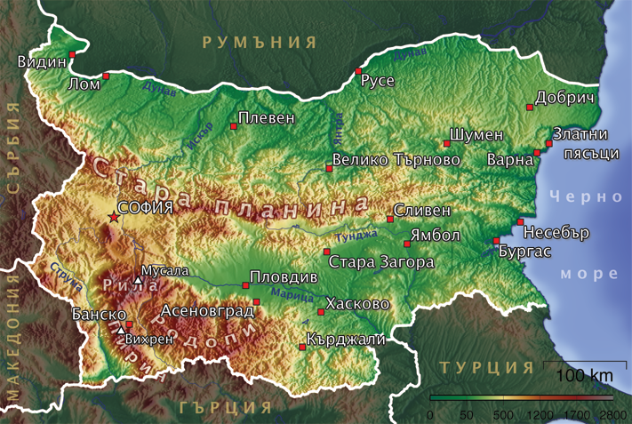 Bulgaria